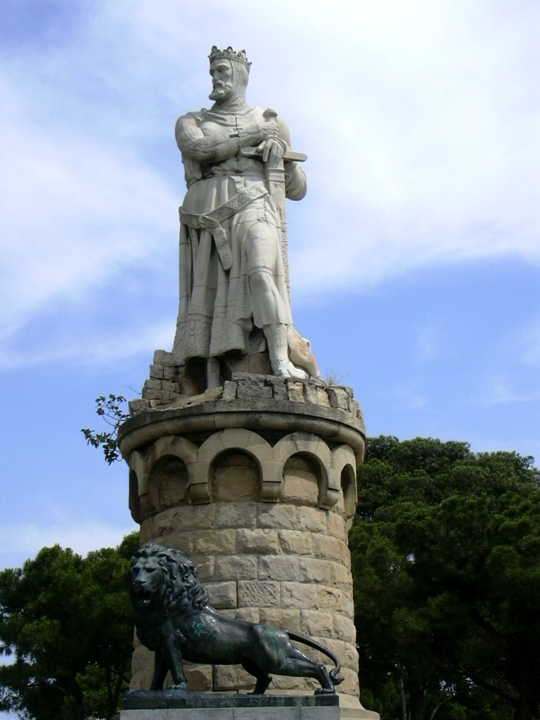 Zaragoza - Estatua de Alfonso I el Batallador en el Parque Grande, 20th c.